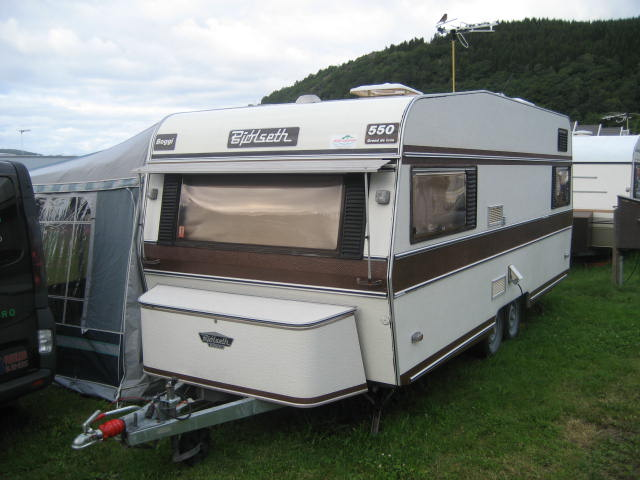 Den norskproduserte campingvogna Bjølseth 550